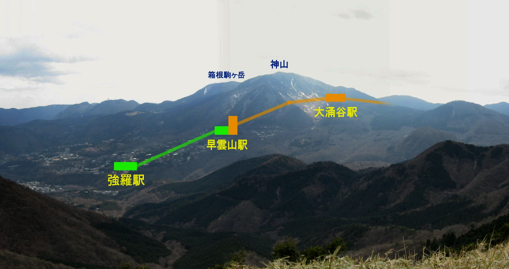 箱根登山ケーブルと箱根ロープウェイ(早雲山～大涌谷)のルート